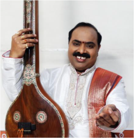 వైజర్సు బాలసుబ్రహ్మణ్యం